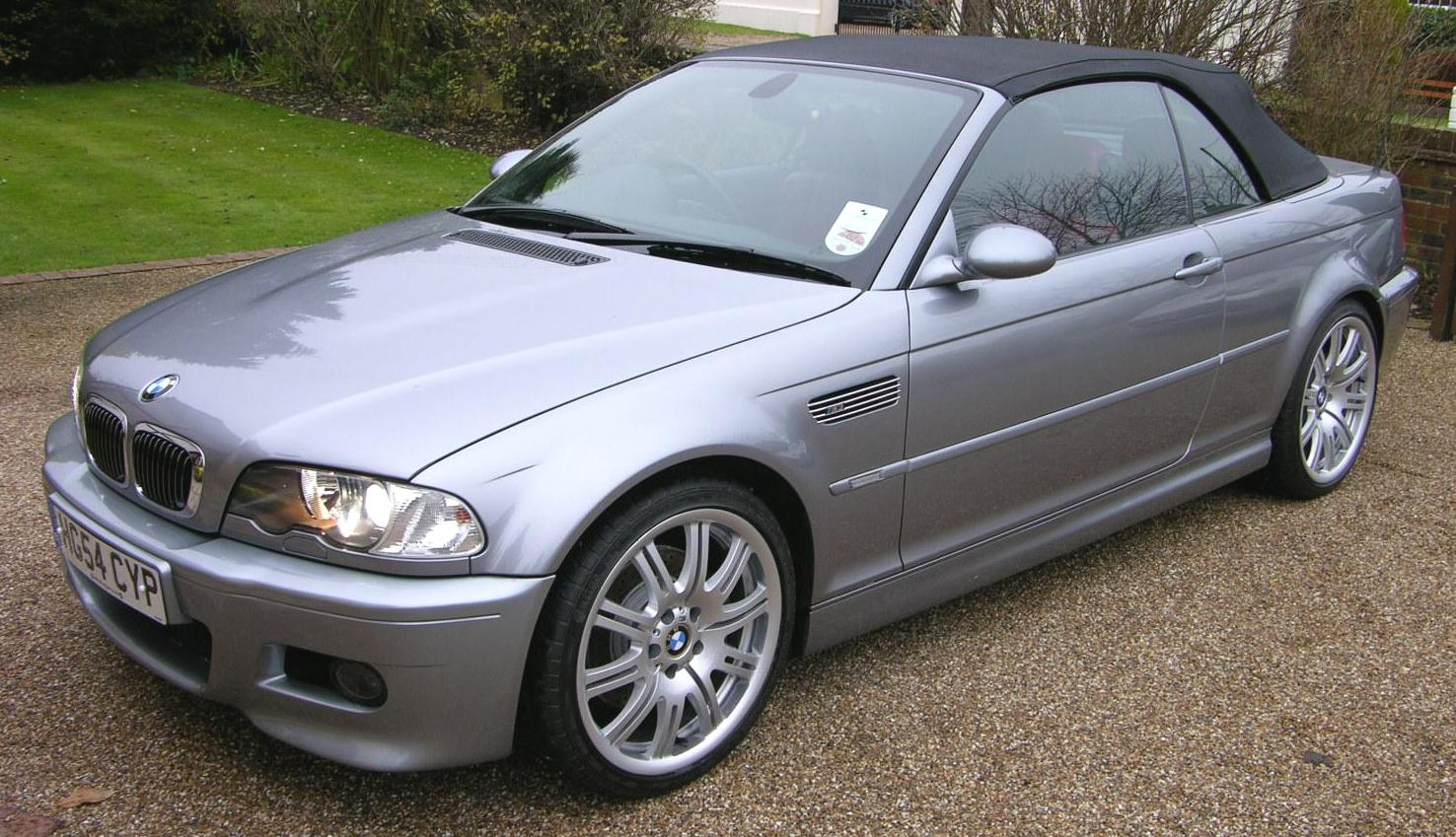 BMW M3 Cabriolet